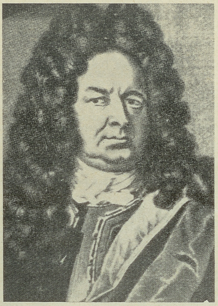 Hans Carl von Carlowitz (Hannß Carl von Carlowitz, 1645-1714), german superintendent of mines (head of the Royal Saxon Mining Department), financier and author. With his ideas of "sustained yield forestry" and "sustainable development" he became the „father of German forestry sciences“ / Hans Carl von Carlowitz (Hannß Carl von Carlowitz, 1645-1714), deutscher Kameralist und Oberberghauptmann. Er schrieb mit der Sylvicultura oeconomica, oder haußwirthliche Nachricht und Naturmäßige Anweisung zur wilden Baum-Zucht (1713) das erste geschlossene Werk über Forstwirtschaft und gilt als Schöpfer des forstlichen Nachhaltigkeitsbegriffs